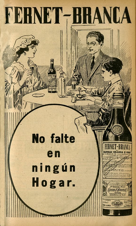 Fernet Branca: infaltable en su mesa. Buenos Aires, 1920.